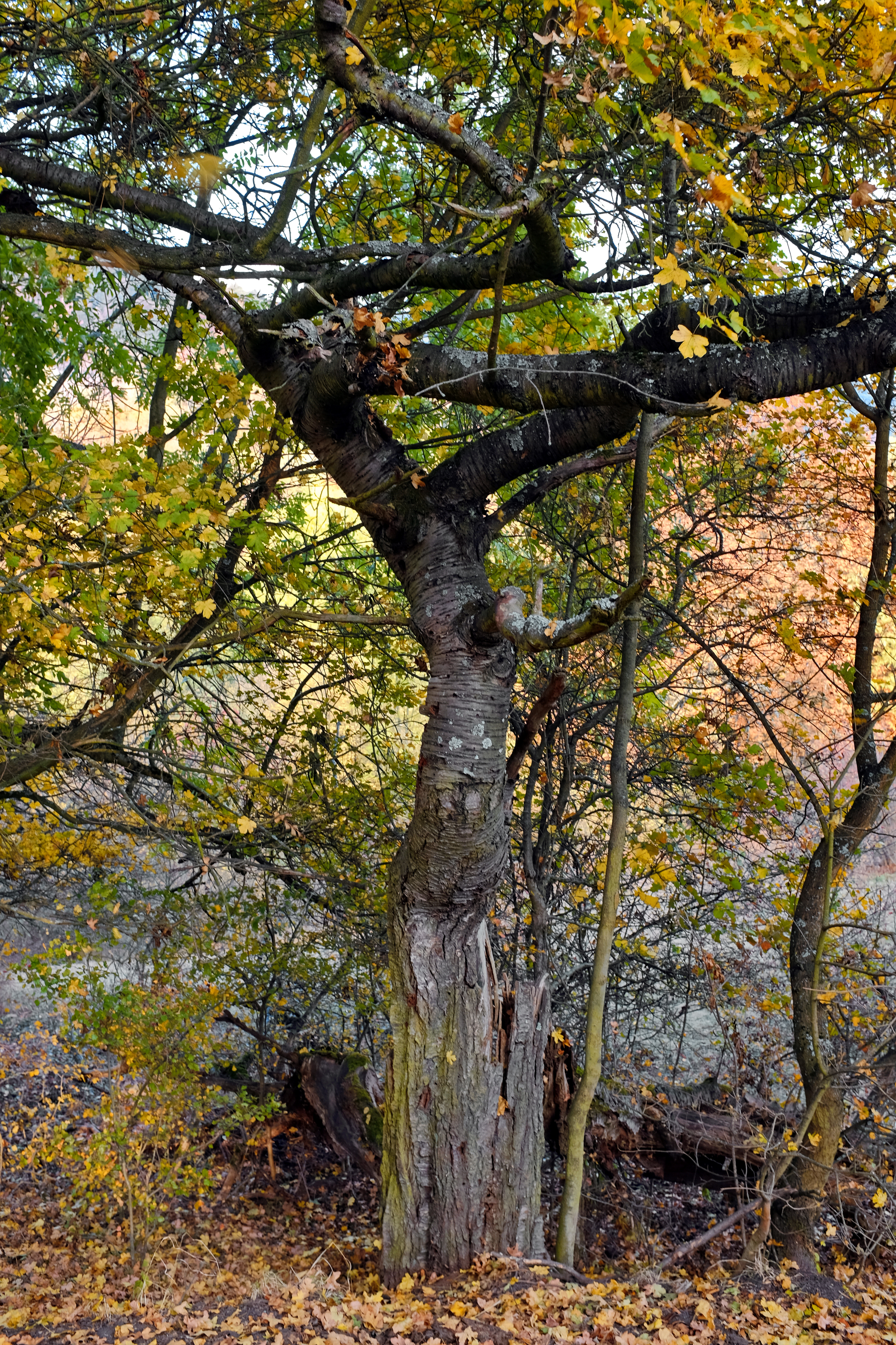 Památný strom - Slavibojův břek, Stráž nad Ohří, Doupovské hory, okres Karlovy Vary